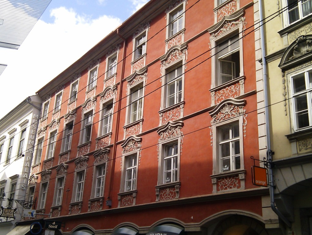 Palais Kellersberg, Sackstraße 14, Graz